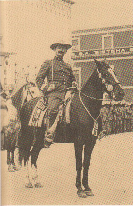 General de Brigada Medardo González Peña